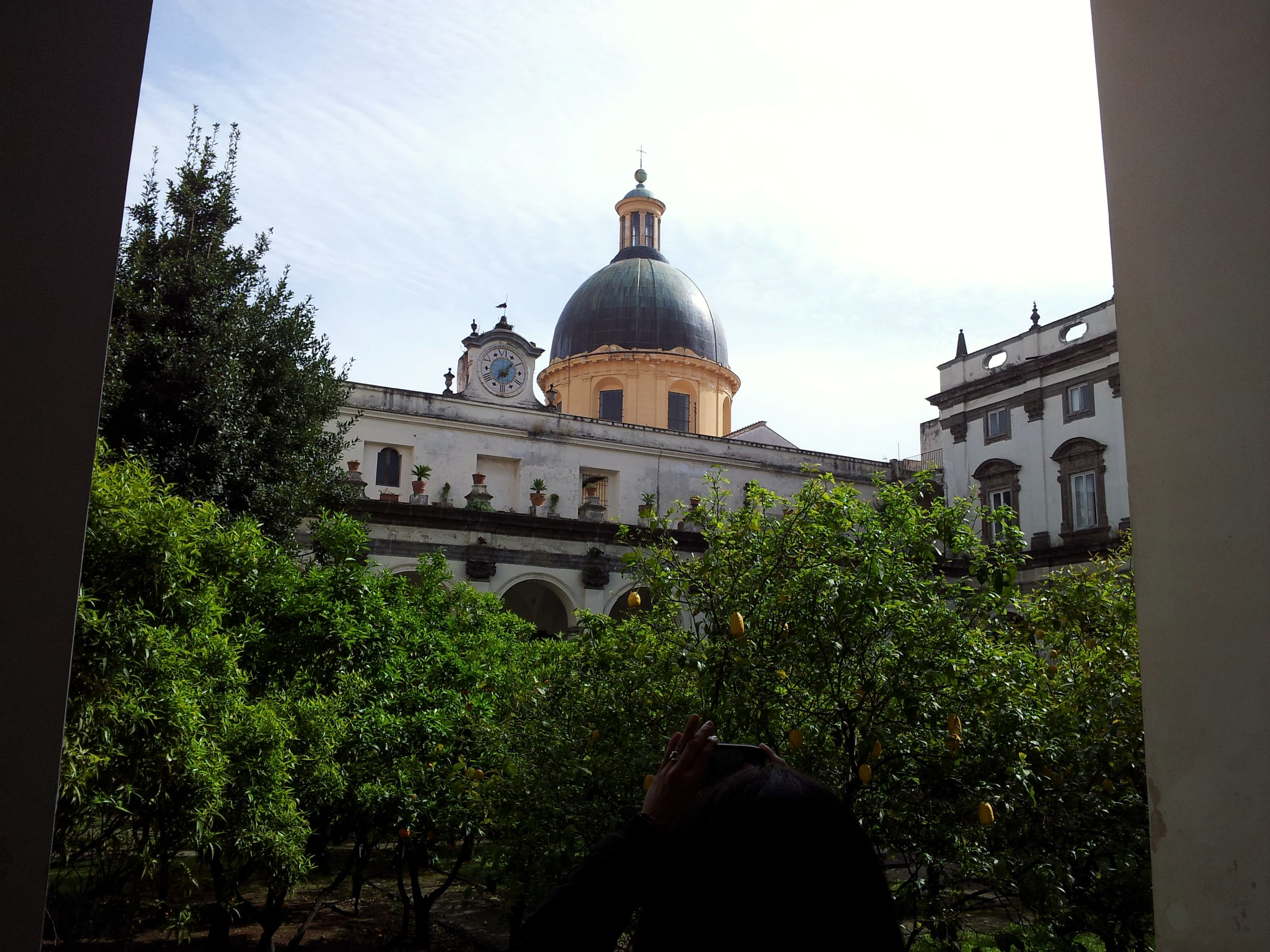 Chiostro degli Aranci (Chiostro grande dei Girolamini, Napoli)